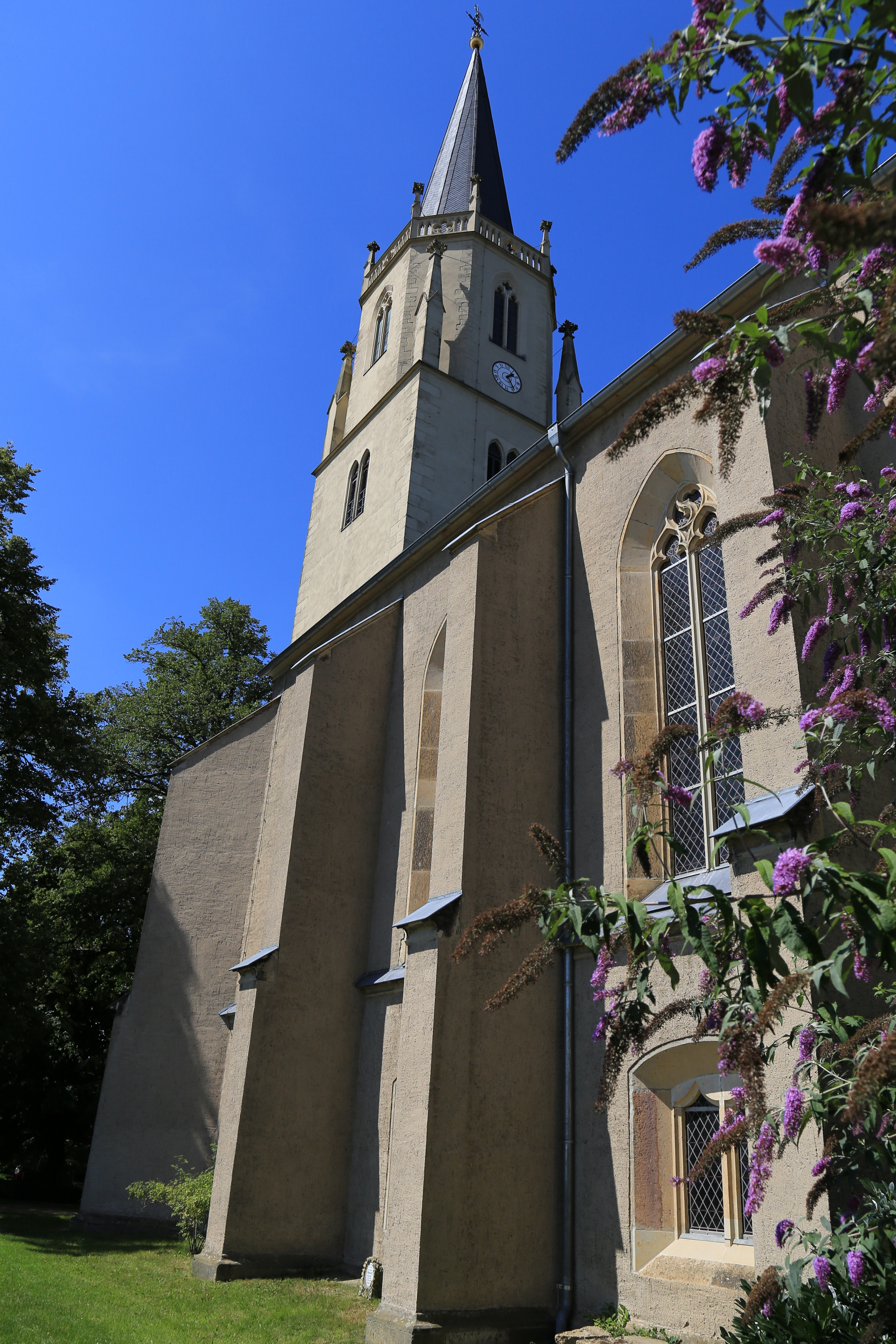 Kirche Wantewitz August 2017 (1)